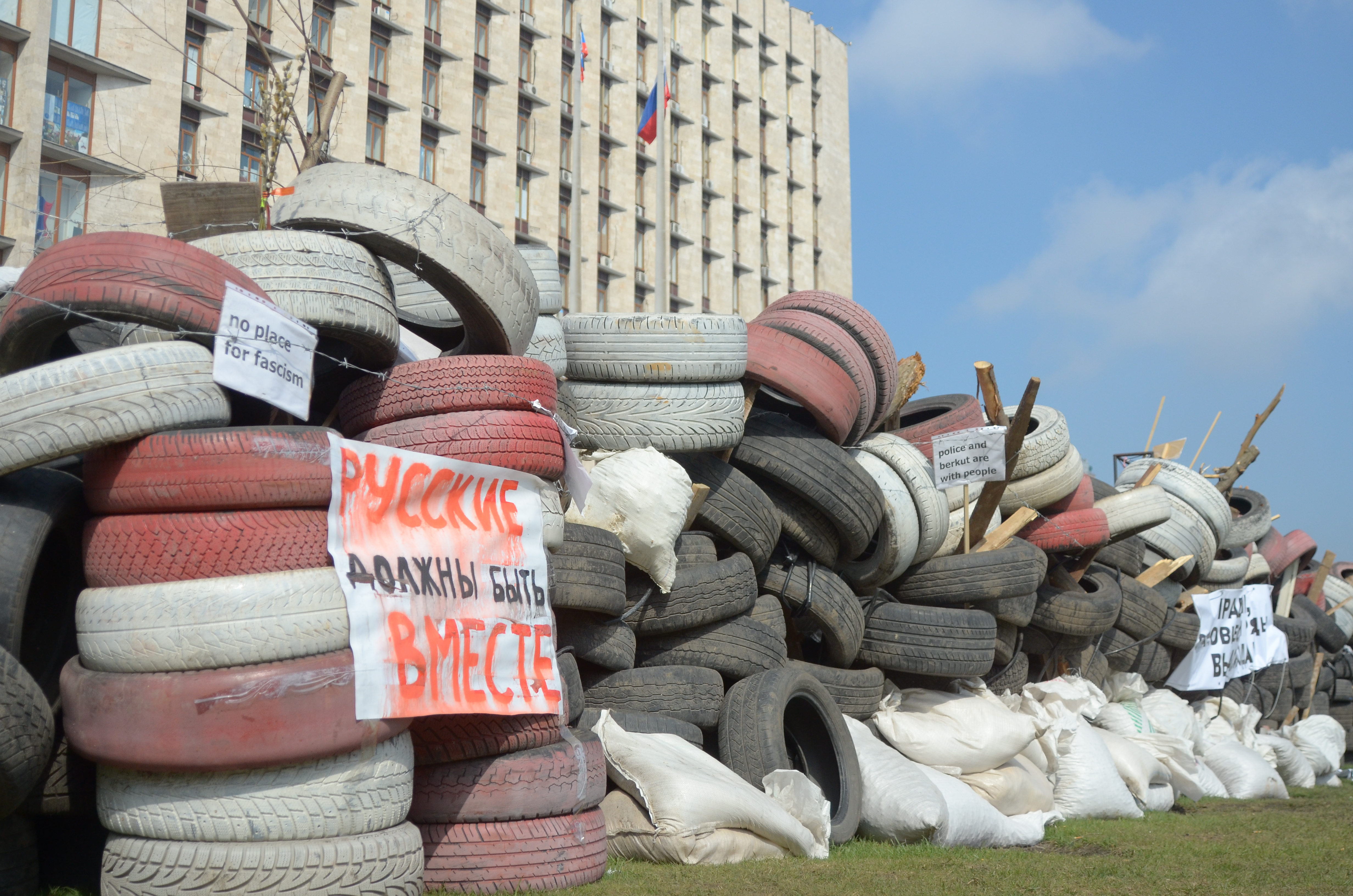 Протесты в Донецке